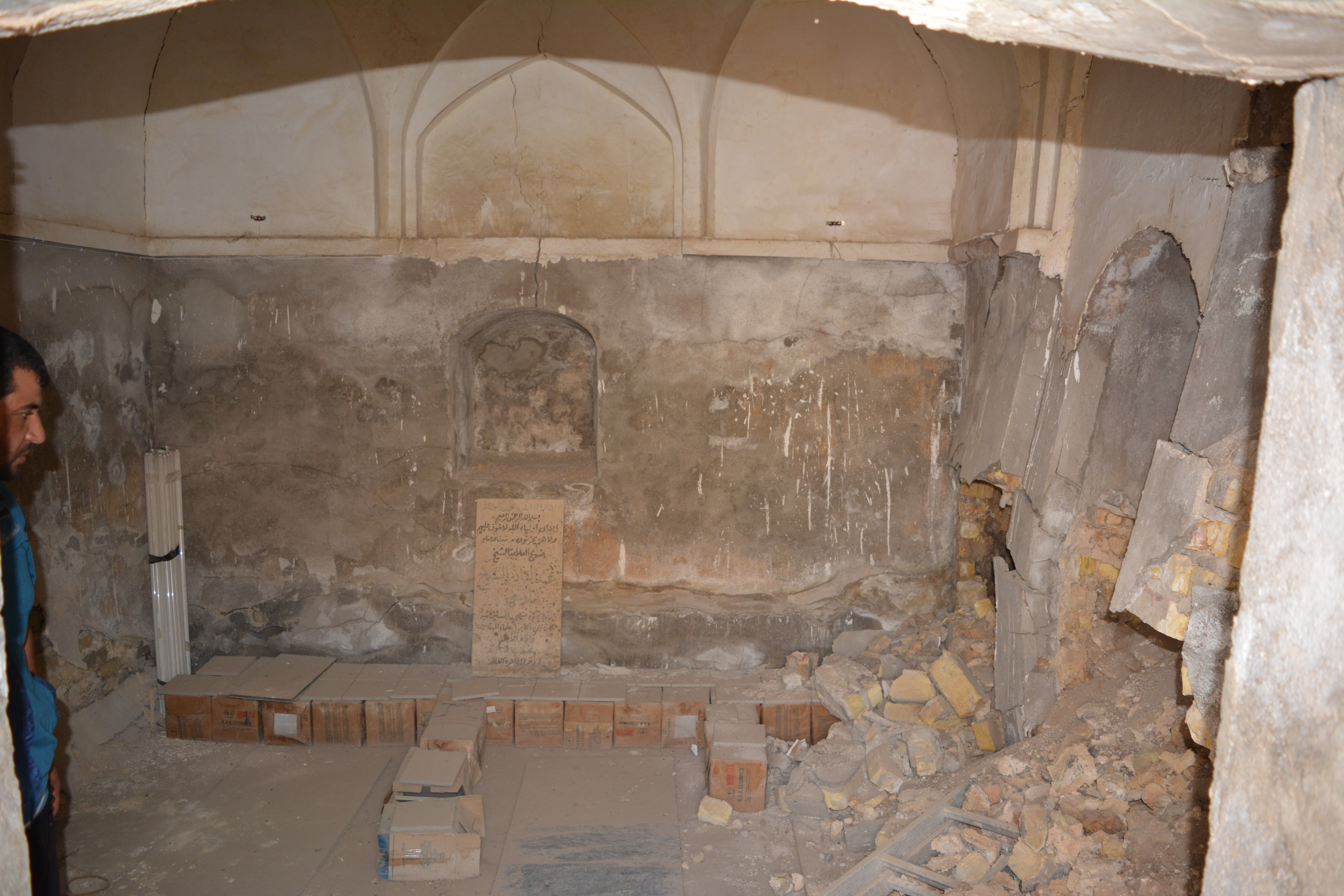 مرقد نعمان أفندي في مسجد النعمانية (الذي يعرف الآن بمسجد السليمانية) في بغداد والذي توفي عام 1770